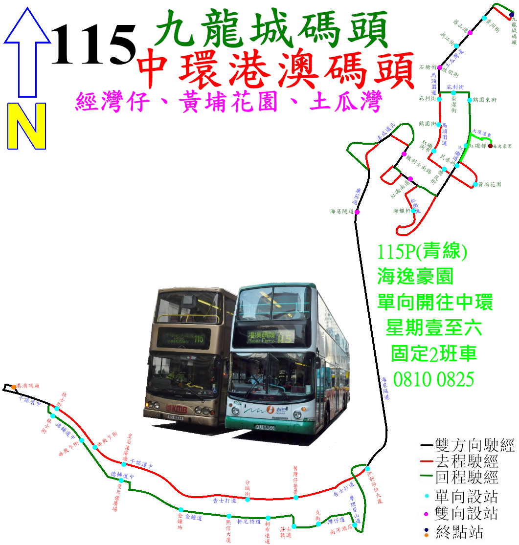 中文（香港）: 過海隧巴115路的走線圖